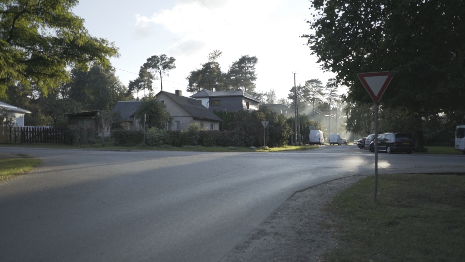 Rožu iela, Berģos